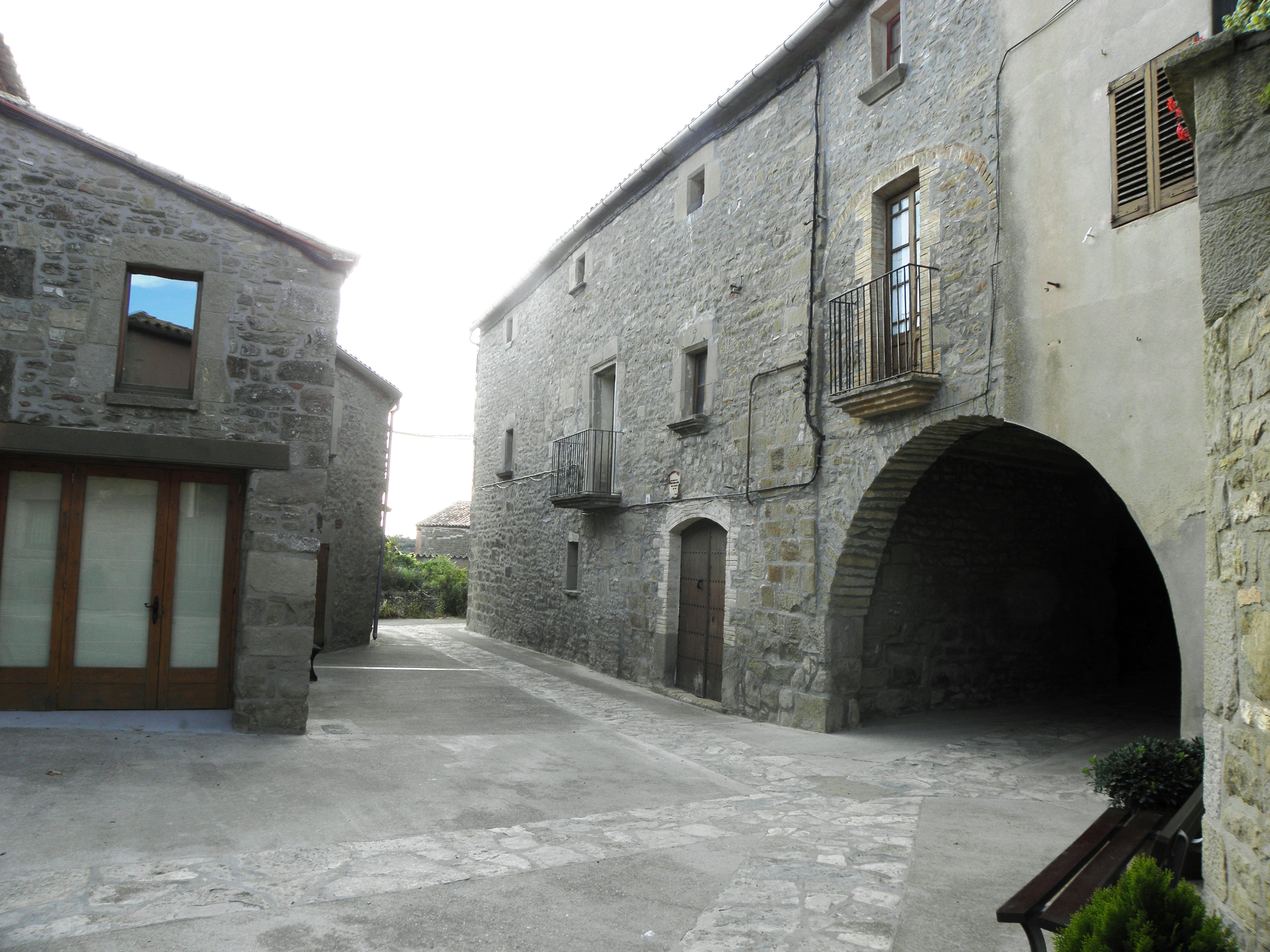 La plaça major de Prades de la Molsosa (la Molsosa, Solsonès). A l'esquerra de la imatge, el local social del poble.